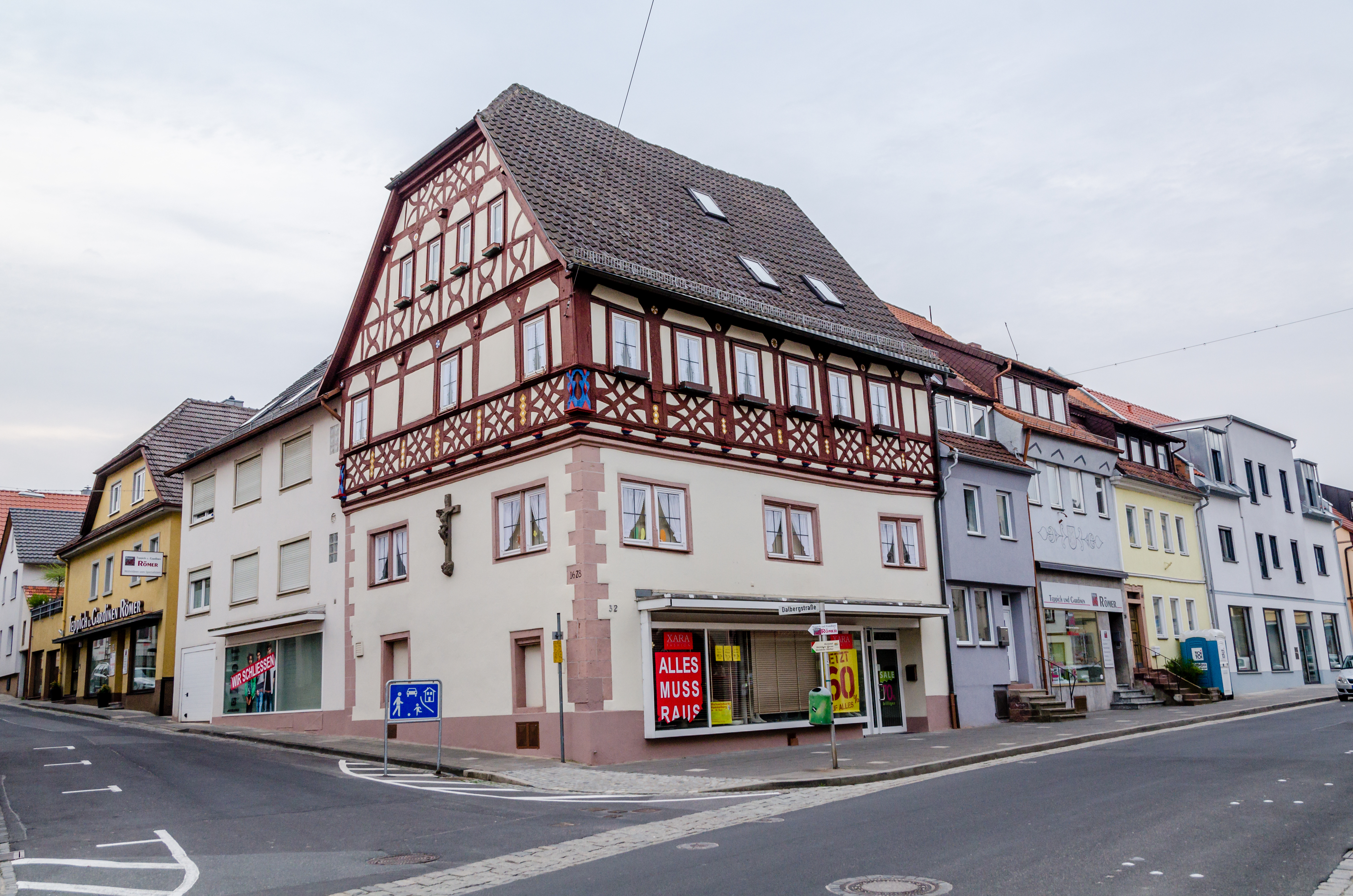 Hammelburg, Bahnhofstraße 32